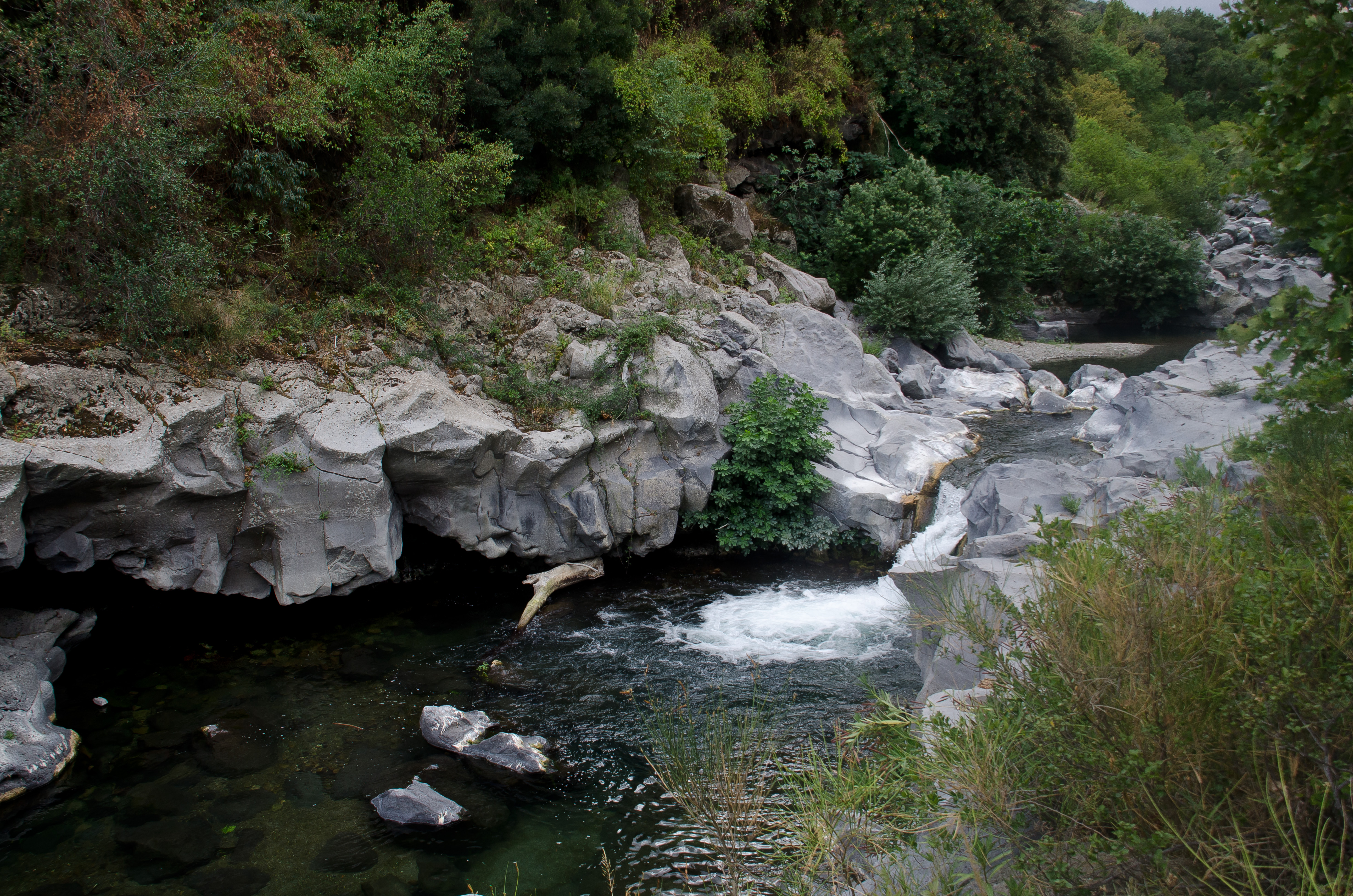 Le Gurne dell'Alcantara, near Francavilla di Sicilia